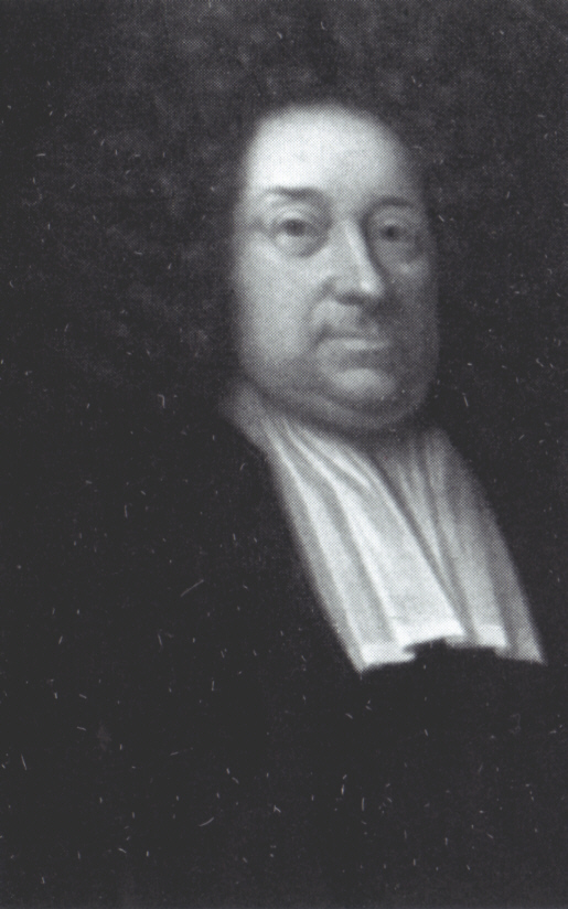 Enoch Schwante der Jüngere (1652-1717), deutscher Pädagoge. Epitaphbildnis in der Lübecker Katharinenkirche.